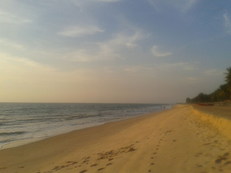 Uppala Beach